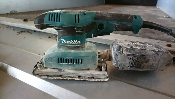 Taldlihvija